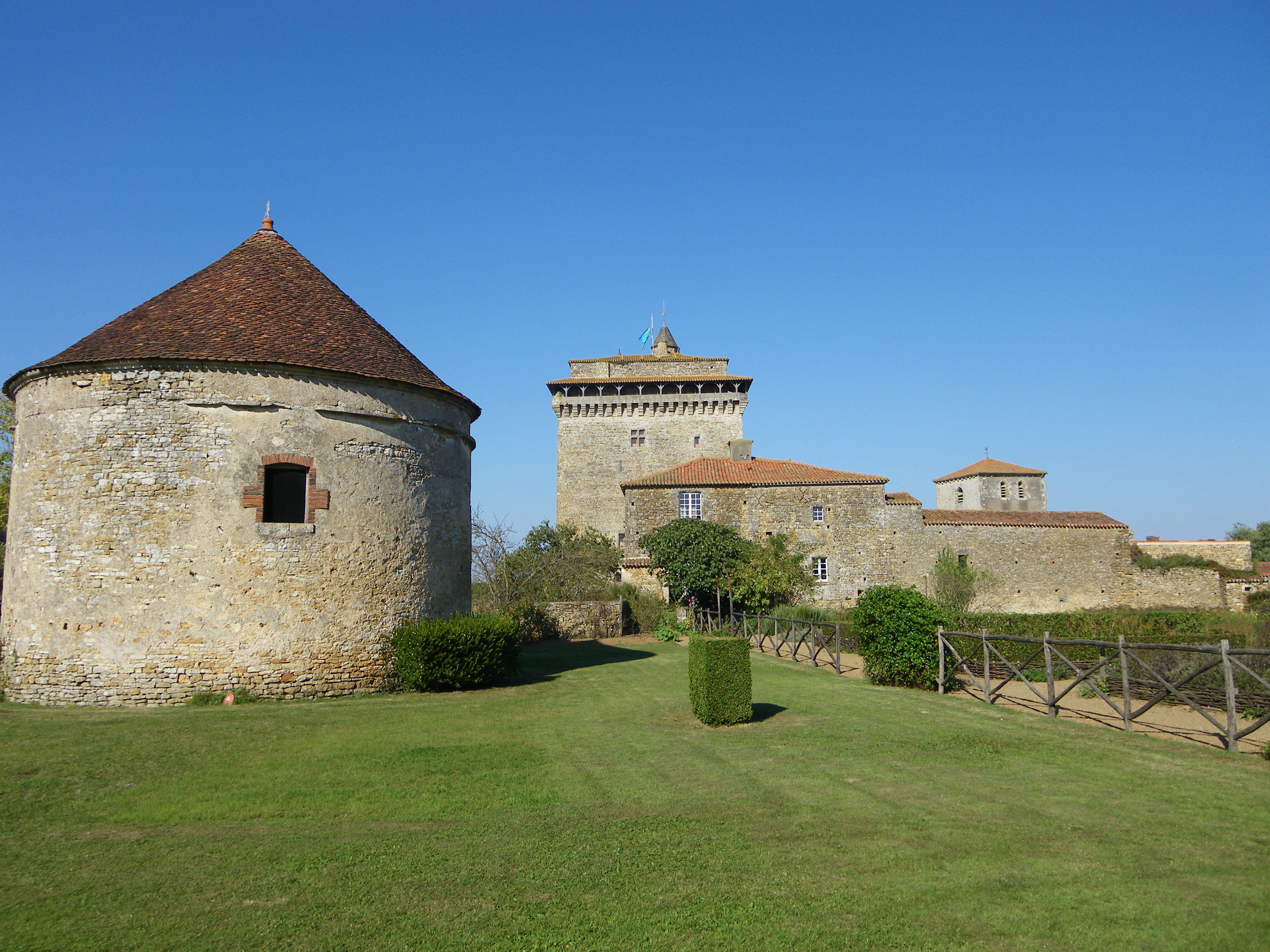 Vue du jardin avec pigeonnier du XVIème siècle et donjon du XIVème siècle.